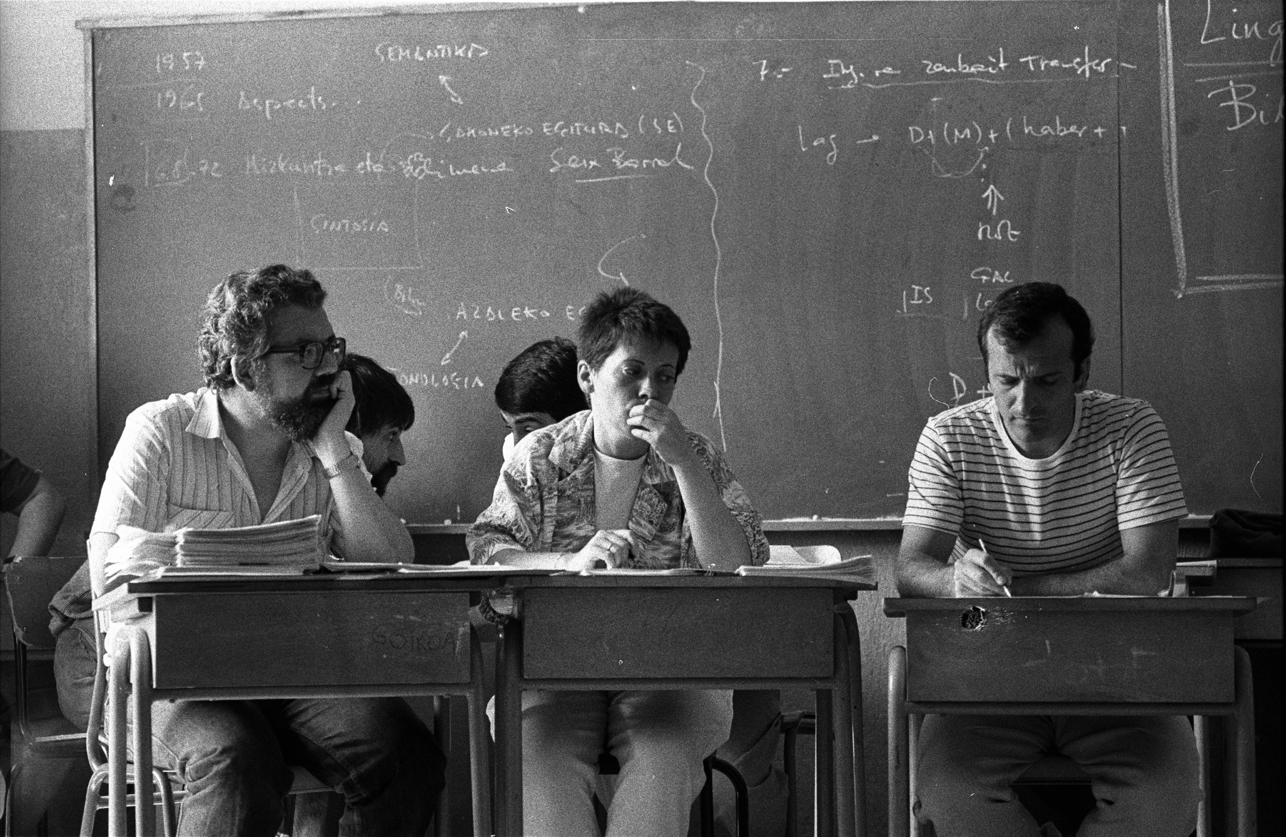 Paulo Agirrebaltzategi soziologoa, Marije Barandiaran Kimikaria eta Joserra Etxebarria fisikaria, 1984an Iruñean Udako Euskal Unibertsitatean.